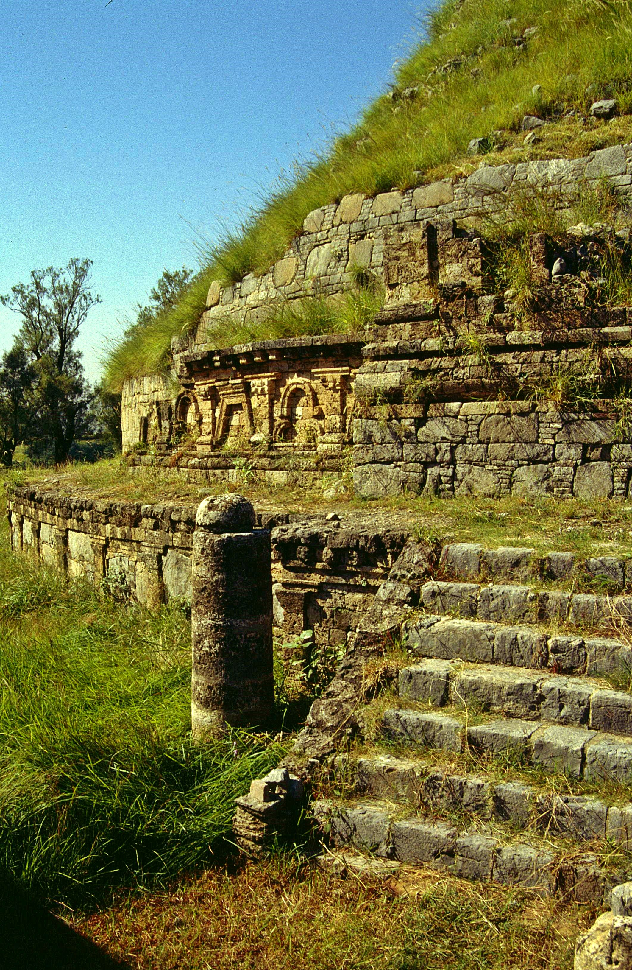 Aufgang zur Dharmadschika-Pagode